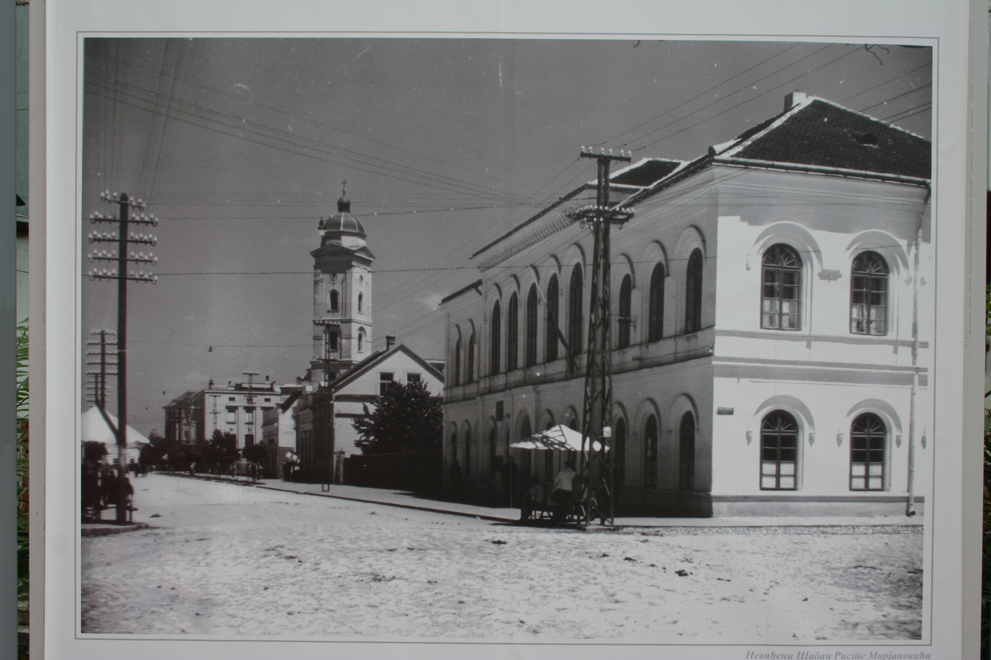 Izložba slika starog Šapca, autora Riste Marjanovića na otvorenom